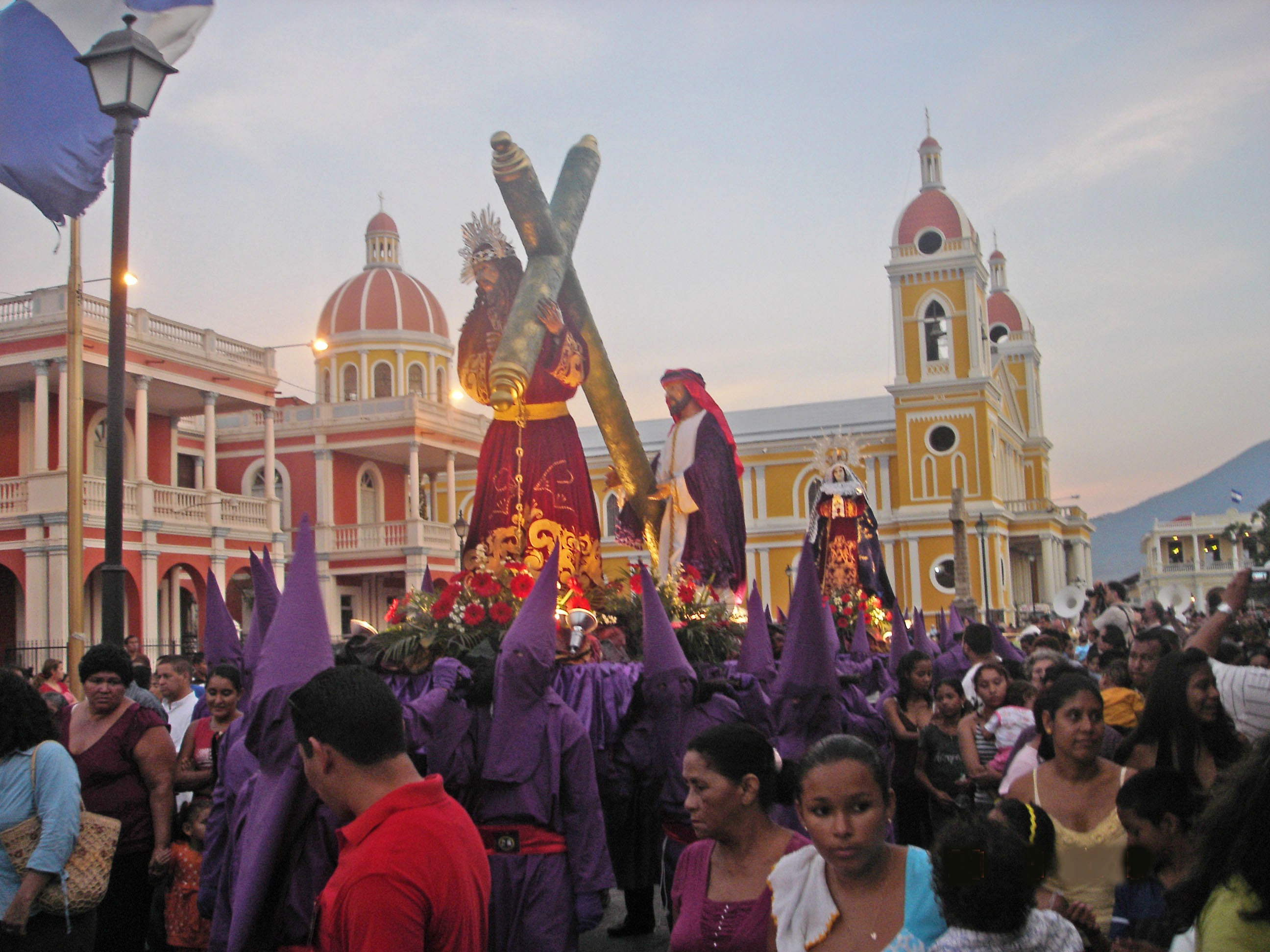 Procesión de Jesús del Gran Poder y la Dolorosa. Plaza de la Independencia.